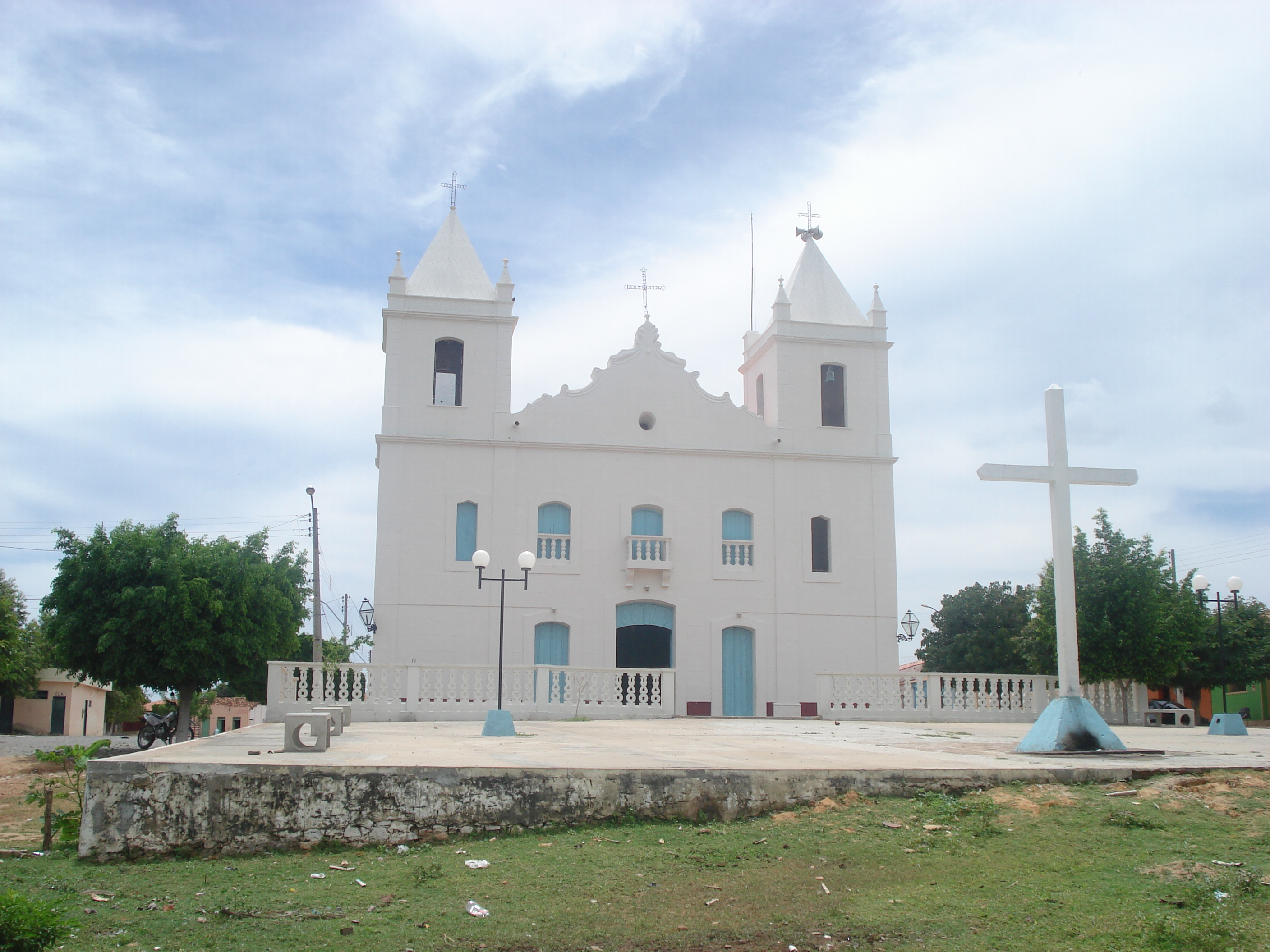 Igreja Matriz de Santo Antonio - Paratinga - Ba